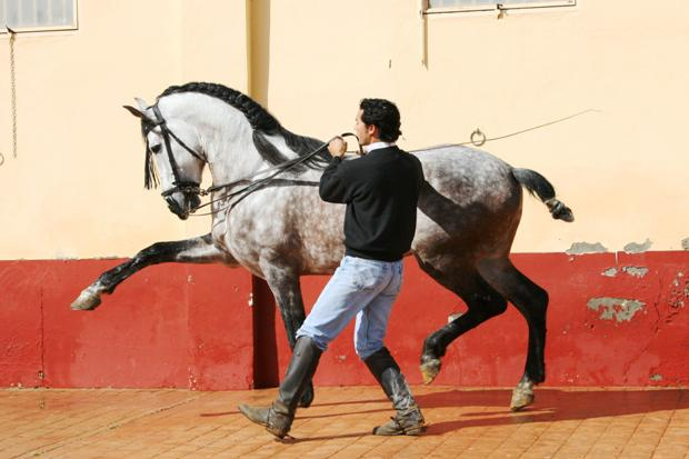 PRE au Pas espagnol. David Vasquez, Sevilla